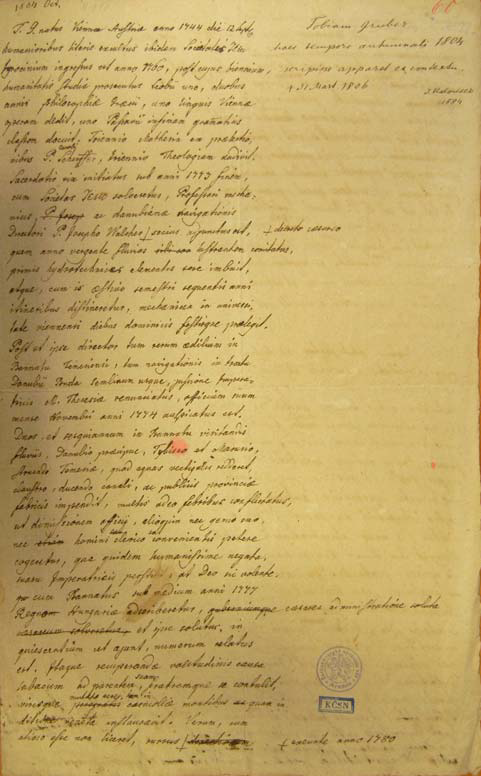 Prva stran T. Gruberjeve avtobiografije datirane oktobra 1804 (Archiv Akademie ved České republiky (Praha)